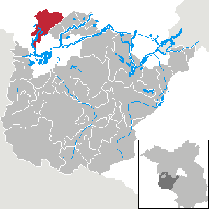 Havelsee in Brandenburg (Country) - District Potsdam-Mittelmark